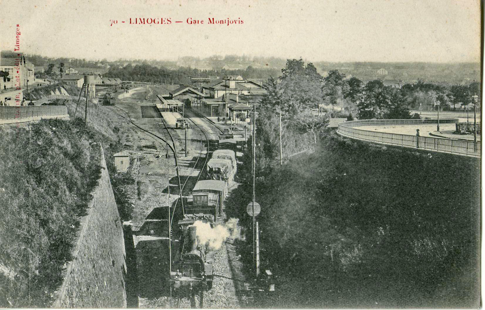 Carte postale ancienne éditée par Datier à Limoges, n°70 : LIMOGES - Gare Montjovis